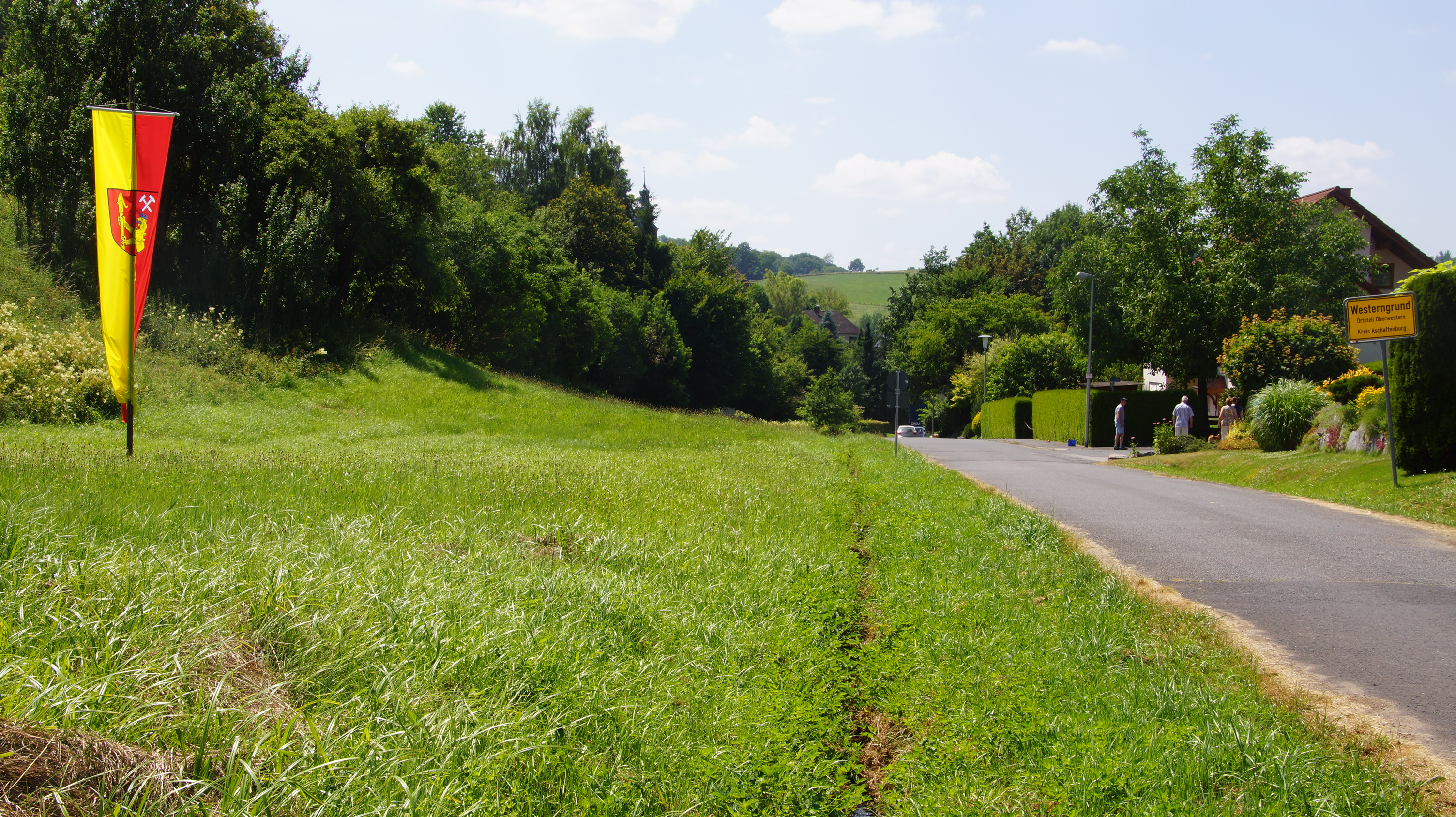 Geographischer Mittelpunkt der Europäischen Union in Westerngrund, Ecke Hirtenweg und Schulzengrundstraße